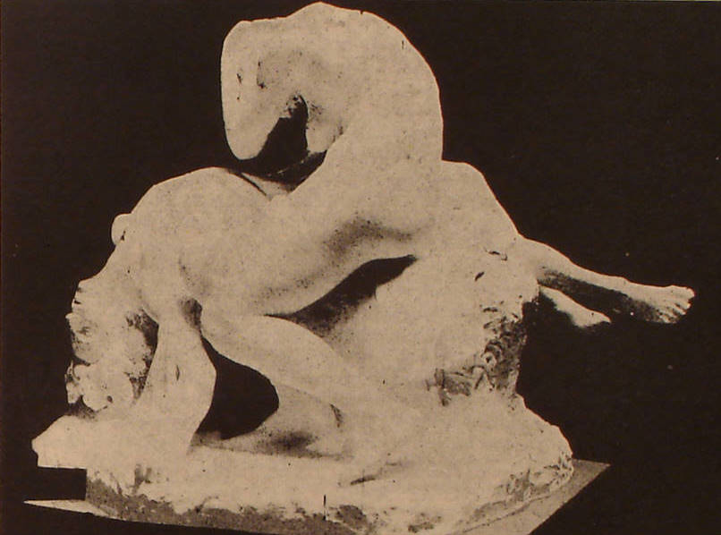 CORRÊA LIMA - Mater dolorosa, ca. 1902. Publicado em ESPINDOLA, Alexandra Filomena. Vida na arte em Gonzaga Duque. 19&20, Rio de Janeiro, v. IV, n.4, out. 2009.